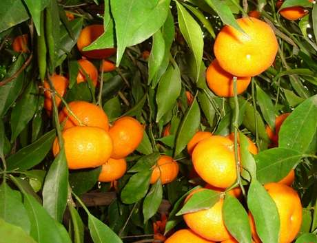 Manderini tardivi tra le fronde dell' albero.